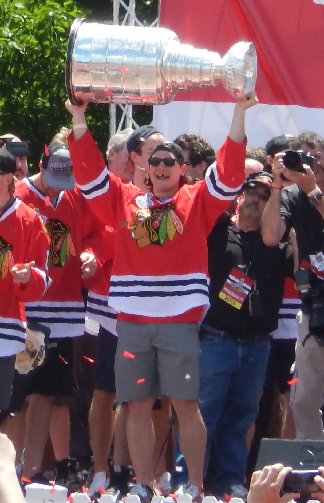 Stanley Cup